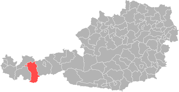 Bezirk Imst in Österreich